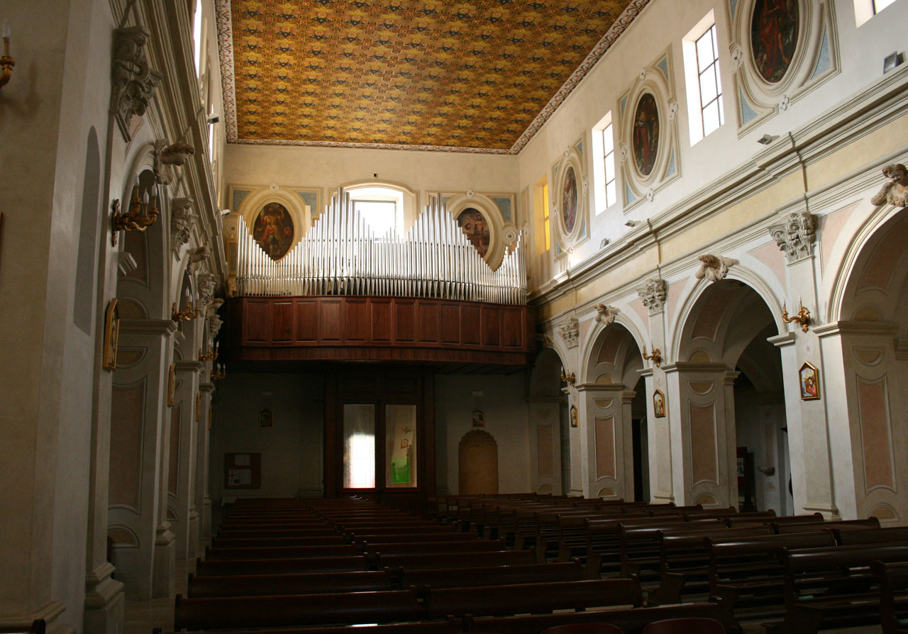 il nuovo organo della cattedrale dell'Annunziata di Tursi